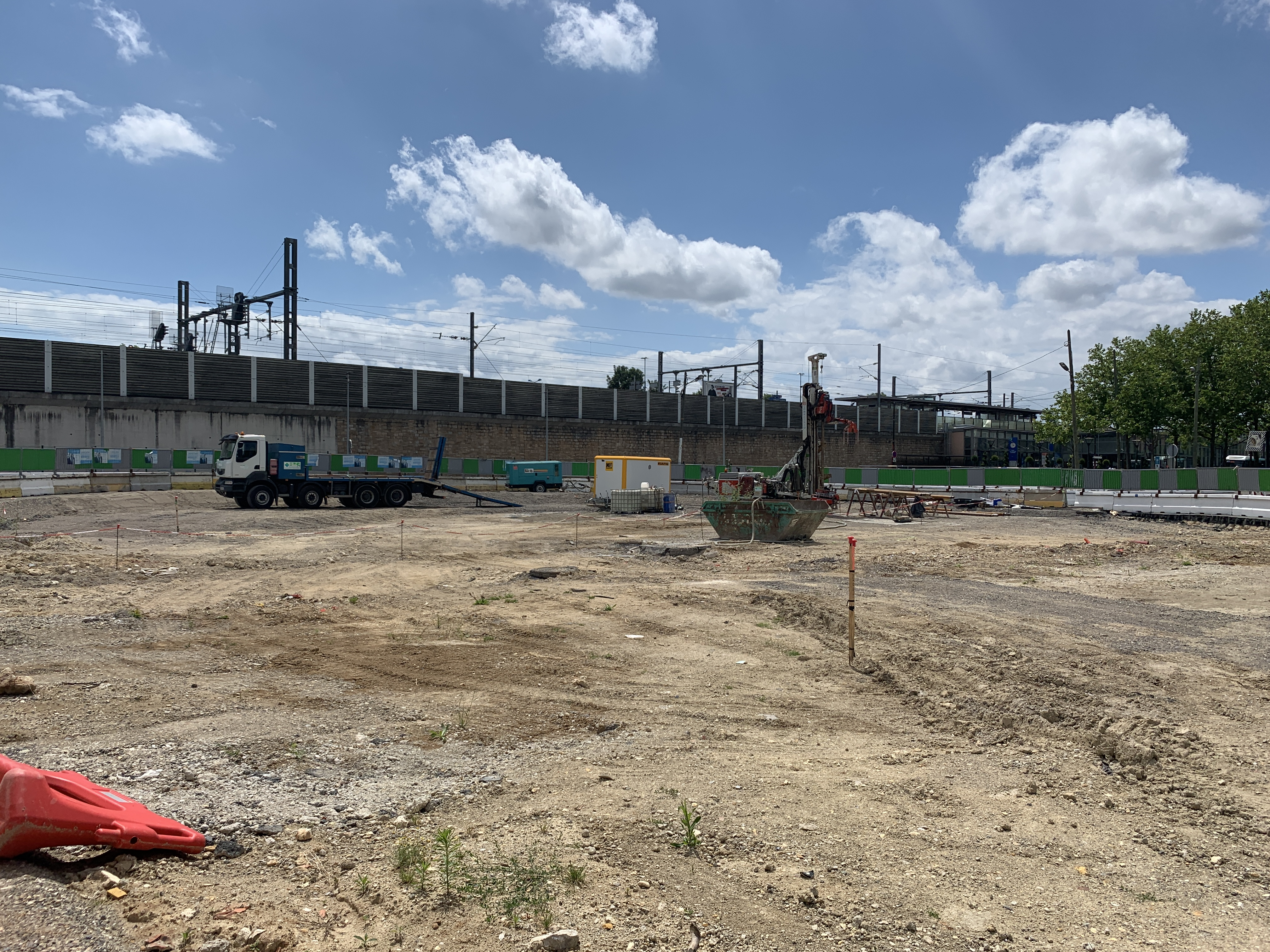 Chantier de la station de Métro Chelles, ligne 16 du Métro de Paris, Chelles, Seine-et-Marne.